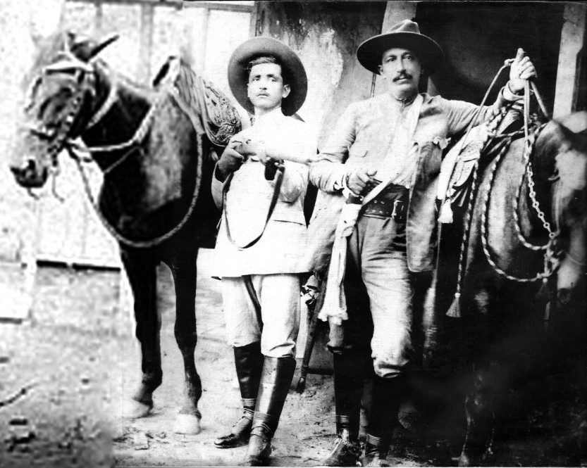 Fotografía del General Pedro Pérez Delgado, “Maisanta”, y su lugarteniente José Dáger, “El Turquito”; s.f. (aprox. 1919). Anónima. Colección Ana Domínguez de Lombana. Versión digital completa: Centro Nacional de Fotografía, CENAF. El original de esta fotografía es propiedad de la familia de la Señora Ana Domínguez de Lombana, hija del General Pedro Pérez Delgado, y se encuentra en la Ciudad de Villa de Cura (Estado Aragua). Reproducciones íntegras o detalles de la misma ha sido usadas como ilustración en portadas e interiores de obras escritas como Maisanta, el último hombre a caballo (1973) de José León Tapia o Las guerrillas de Maisanta (2009) de Oldman Botello, Cronista de la Ciudad de Maracay. También hay una copia de 4,5 x 5 mts y otra reproducción de 1,80 x 1,15 mts en el vestíbulo y en depósitos del Museo de los Llanos, en la ciudad de Barinas.